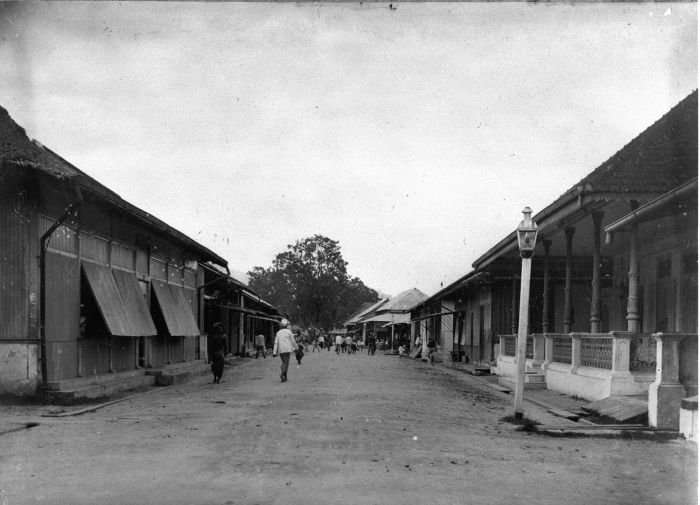 Foto. Een Chinese straat met winkels en woonhuizen in Ambon, Molukken.